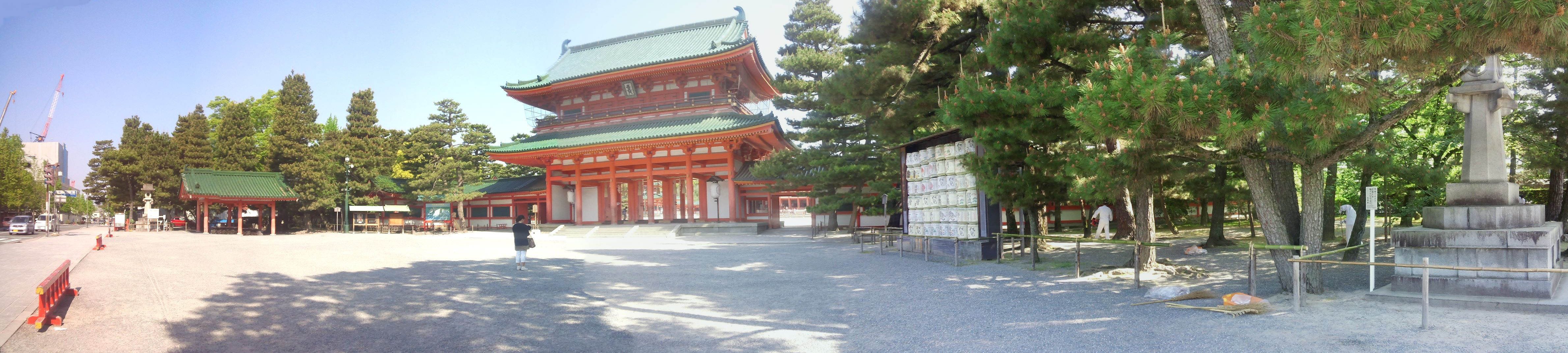 平安神宮 パノラマ（應天門前）